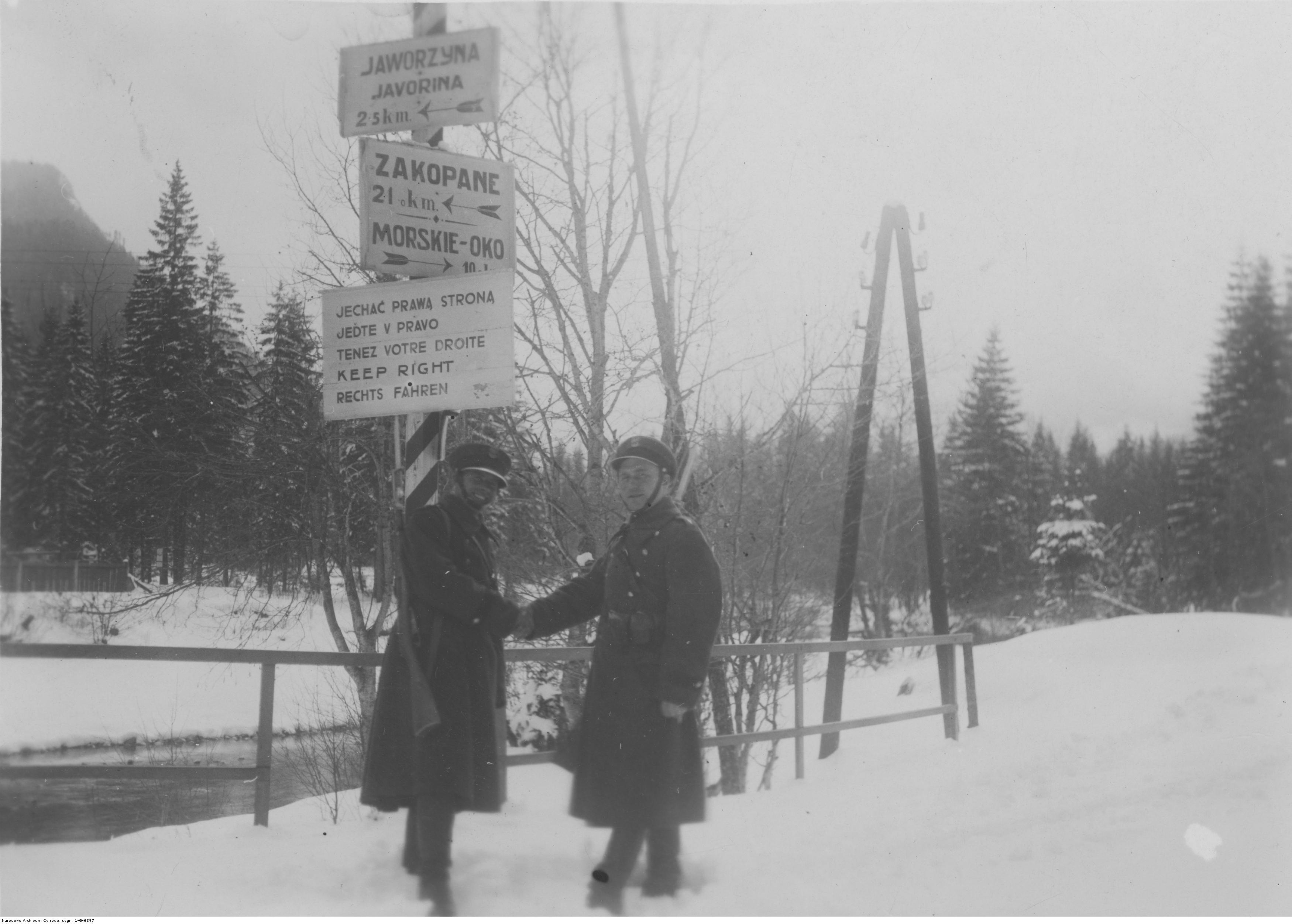 Straż Graniczna na Łysej Polanie (granica z Czechosłowacją). Koncern Ilustrowany Kurier Codzienny - Archiwum Ilustracji. Sygnatura: 1-G-6397